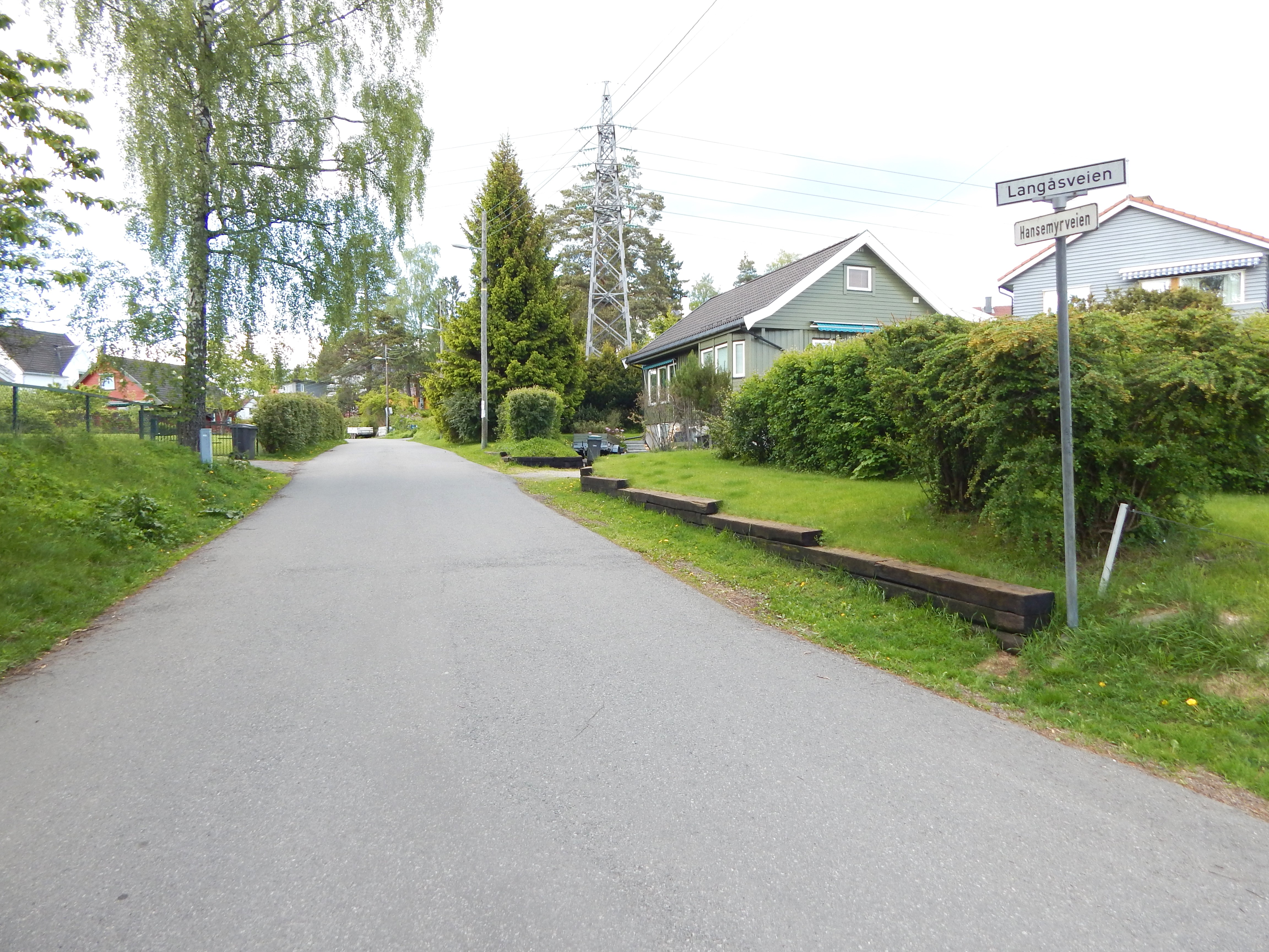 Hansemyrveien sett fra Langåsveien